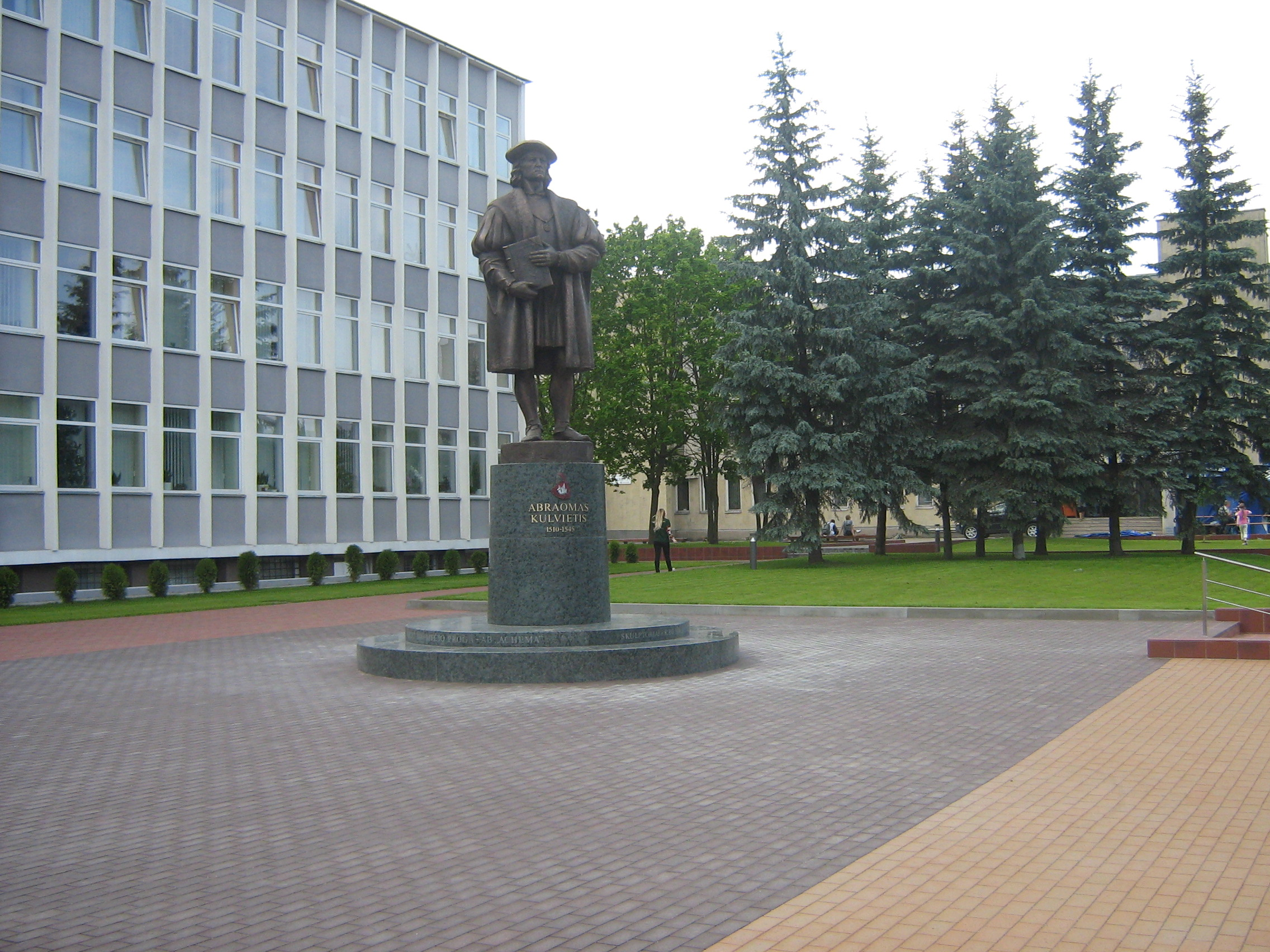 Abraomo Kulviečio paminklas